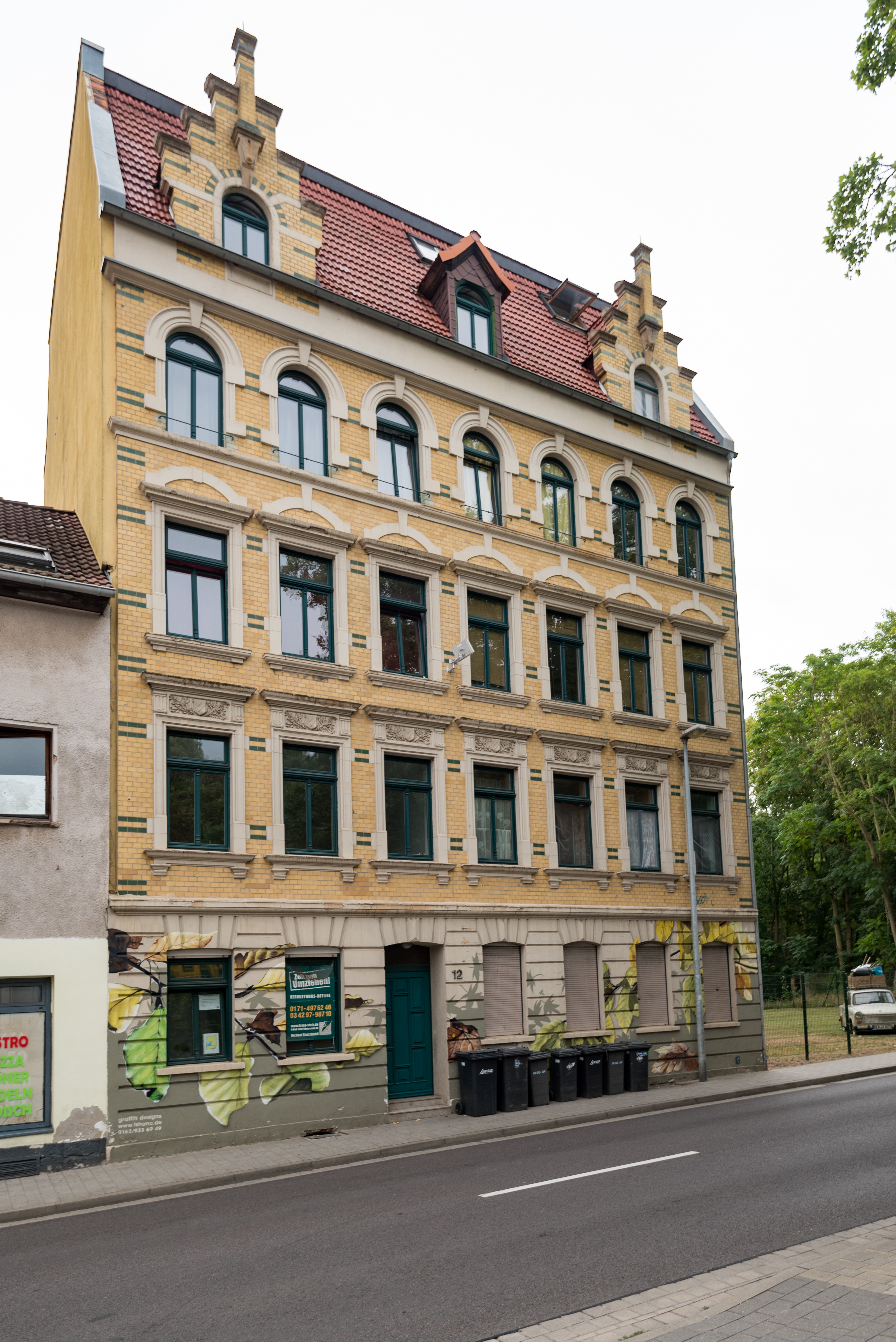 Weißenfels, Langendorfer Straße 12